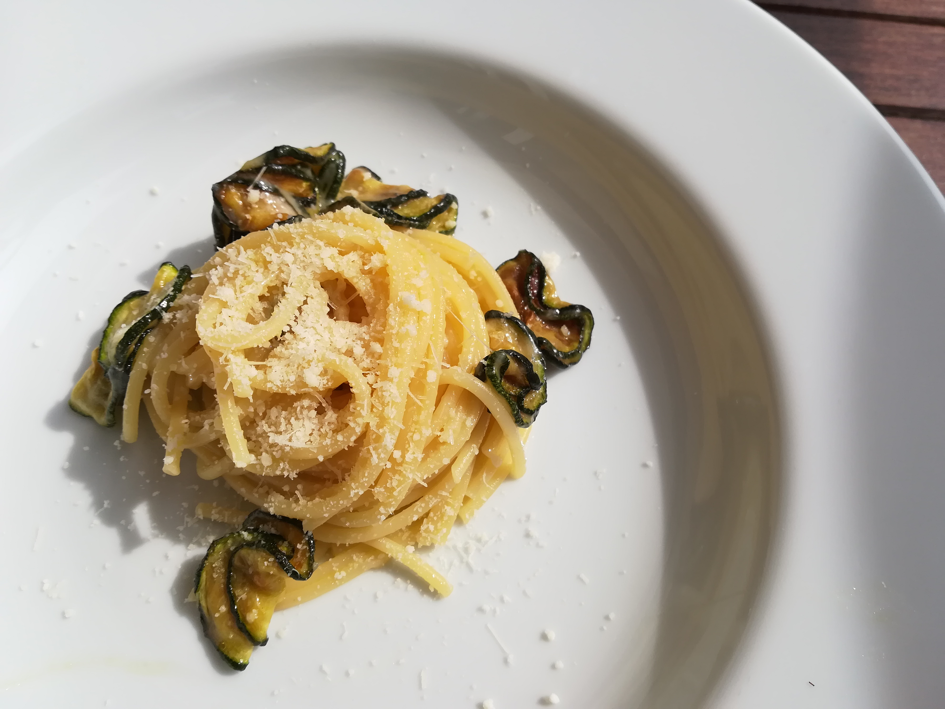 Spaghetti alla Nerano - fried zucchinis and provolone di Monaco